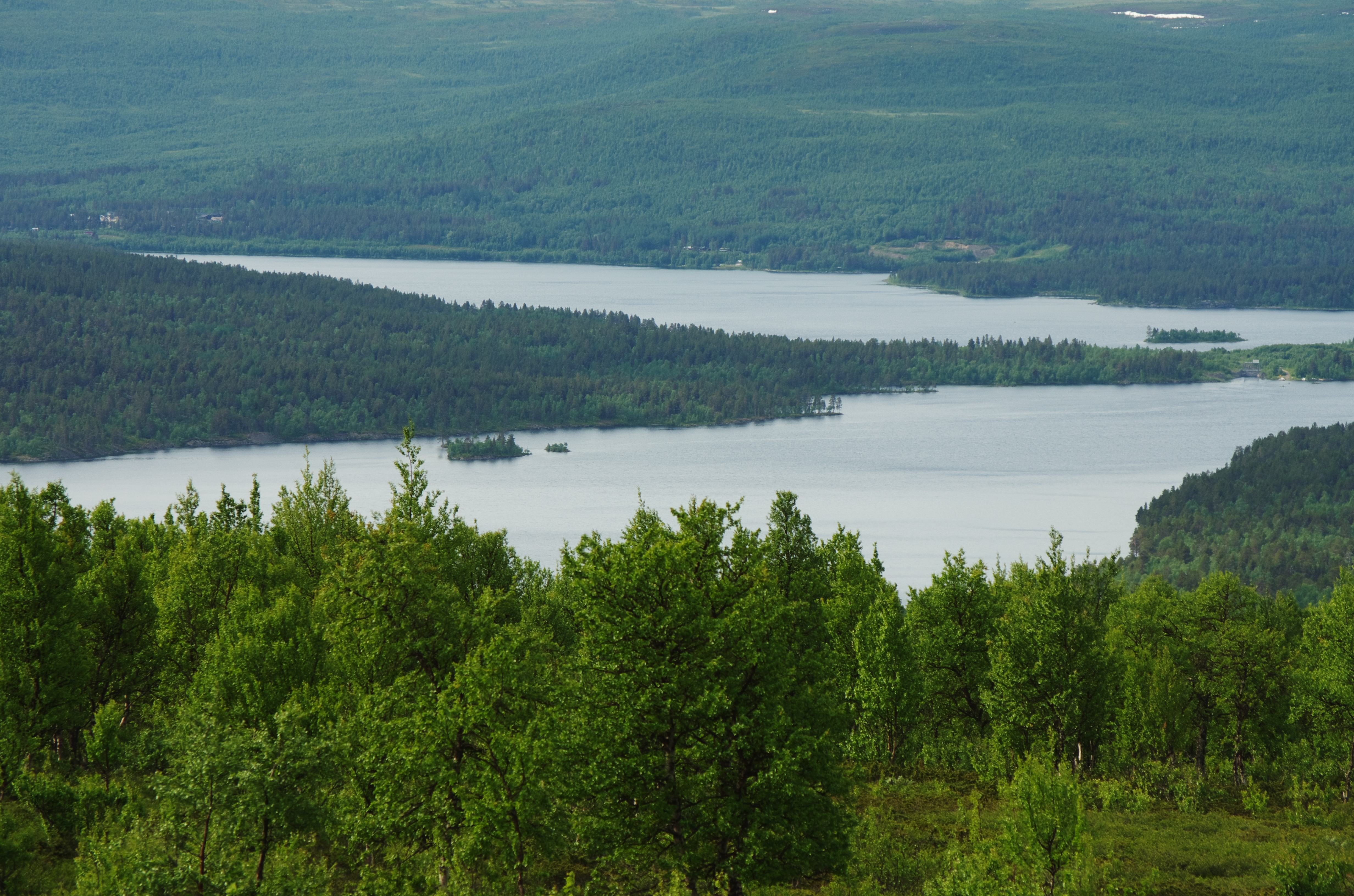 Nordvästra ändan av sjön Hornavan.